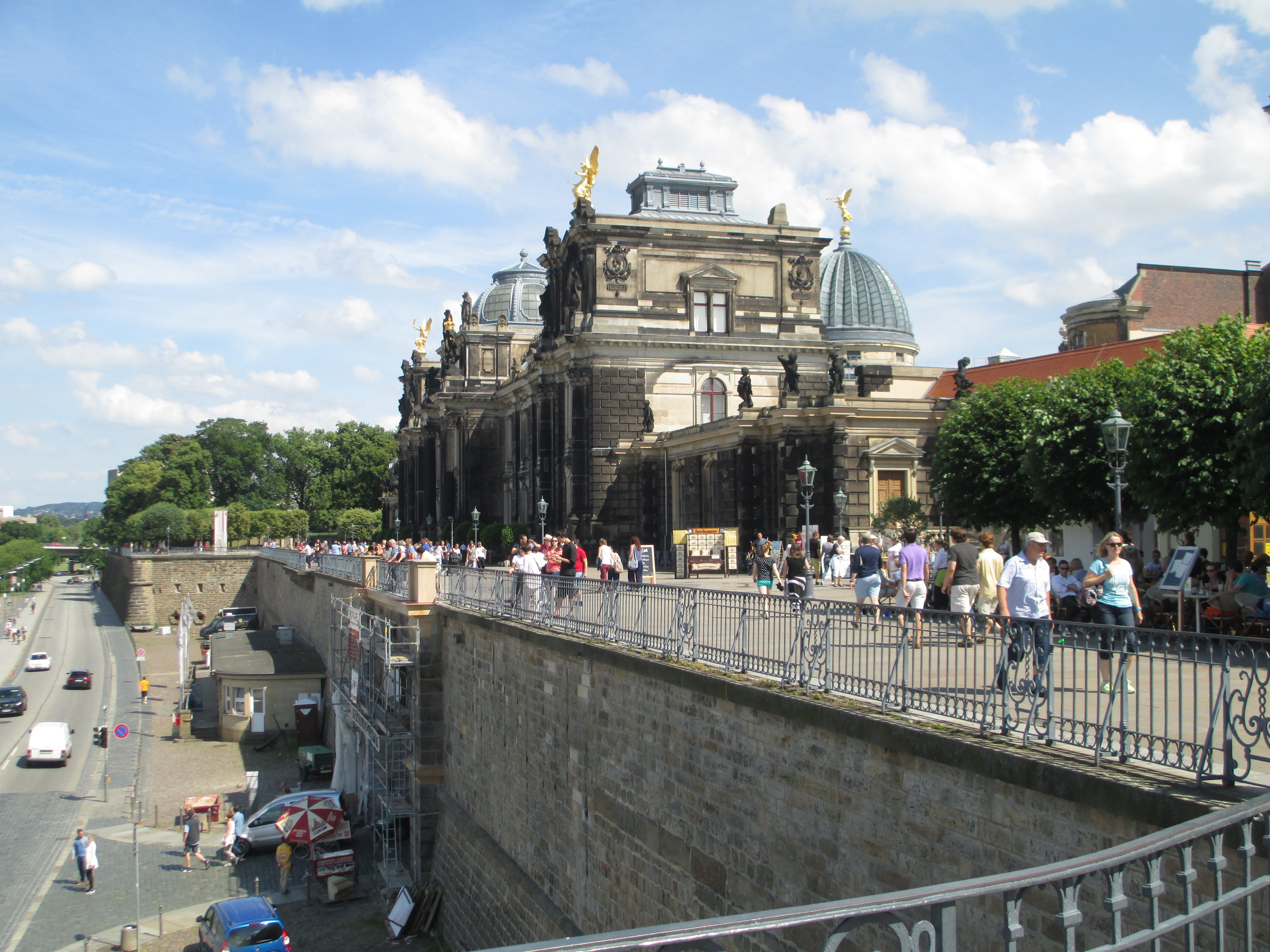 מרפסת ברוהל בדרזדן